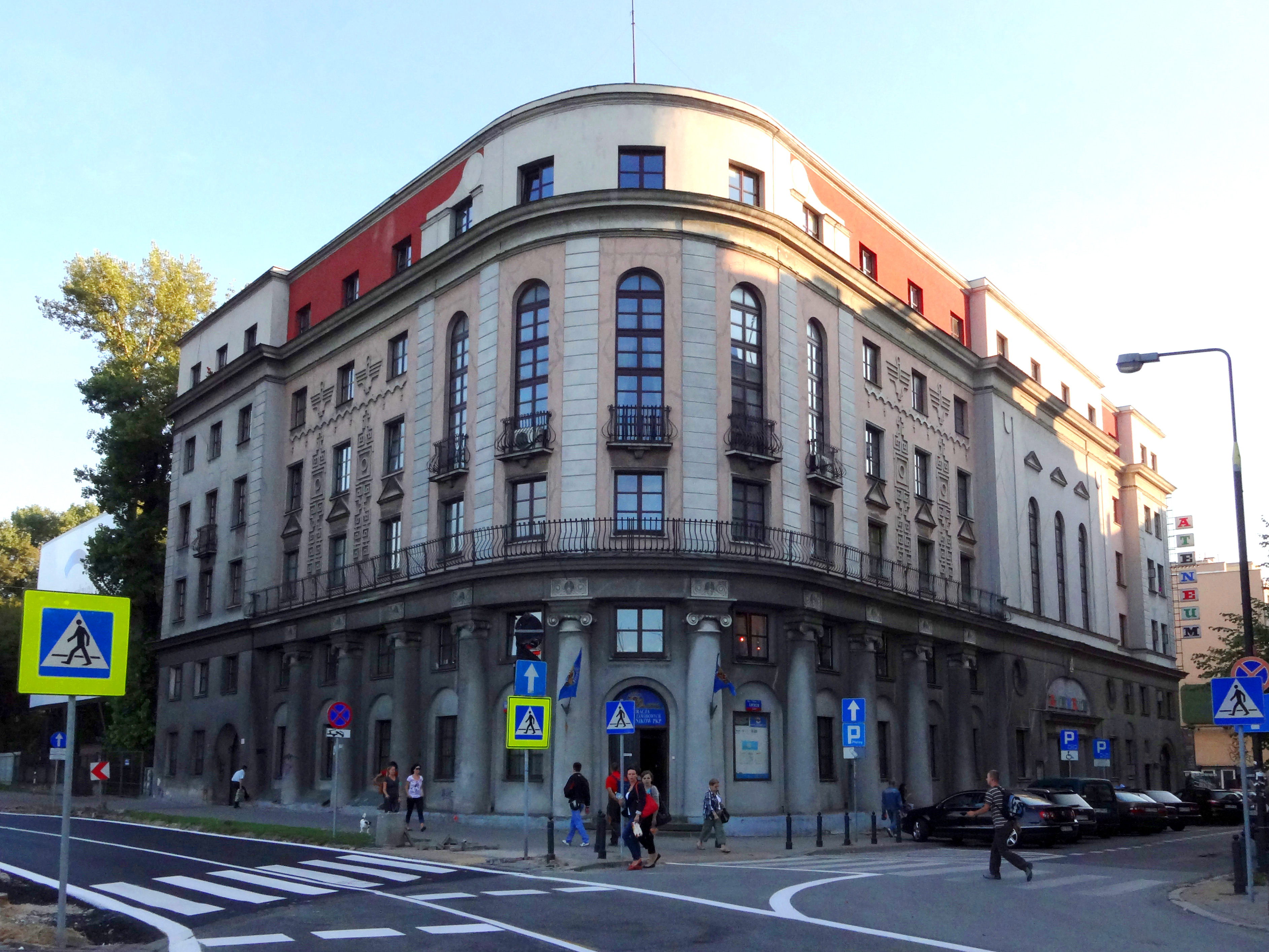 Dom związku zawodowego kolejarzy z teatrem "Ateneum", ul. Jaracza 2, Warszawa